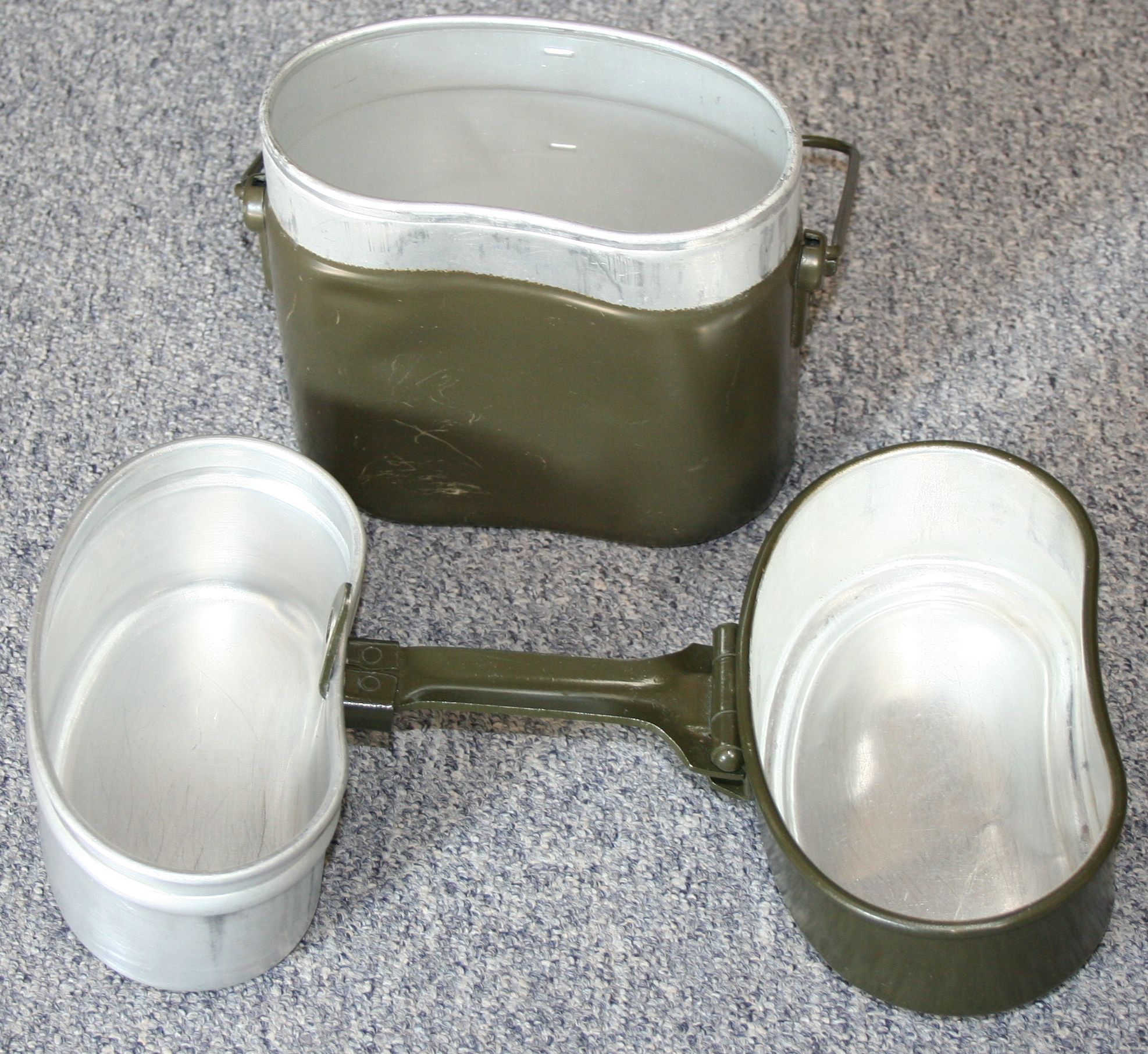 Henkelmann aus Metall, geöffnet (Bundeswehr ca. 80er Jahre)